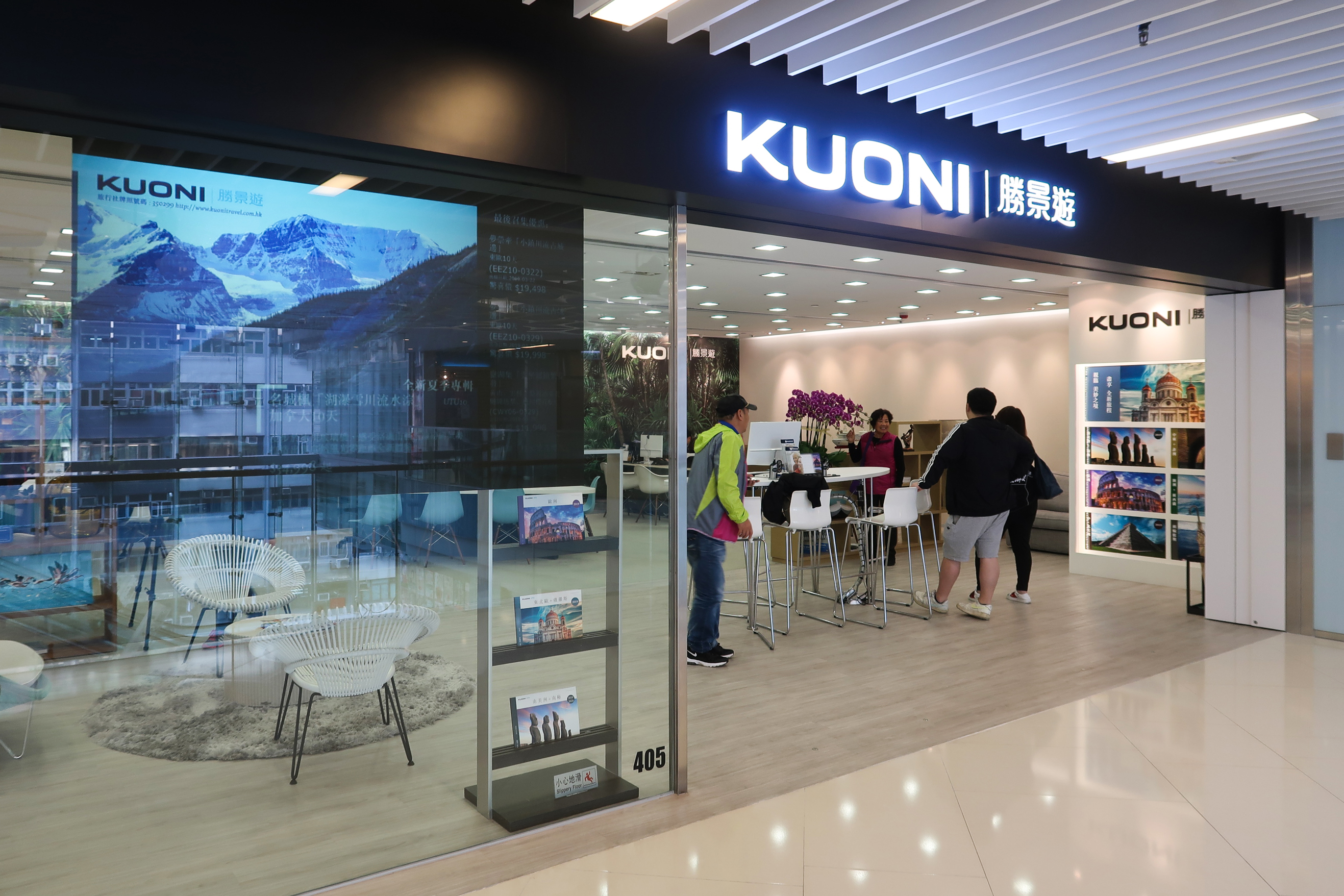 KUONI Branch in iSQUARE